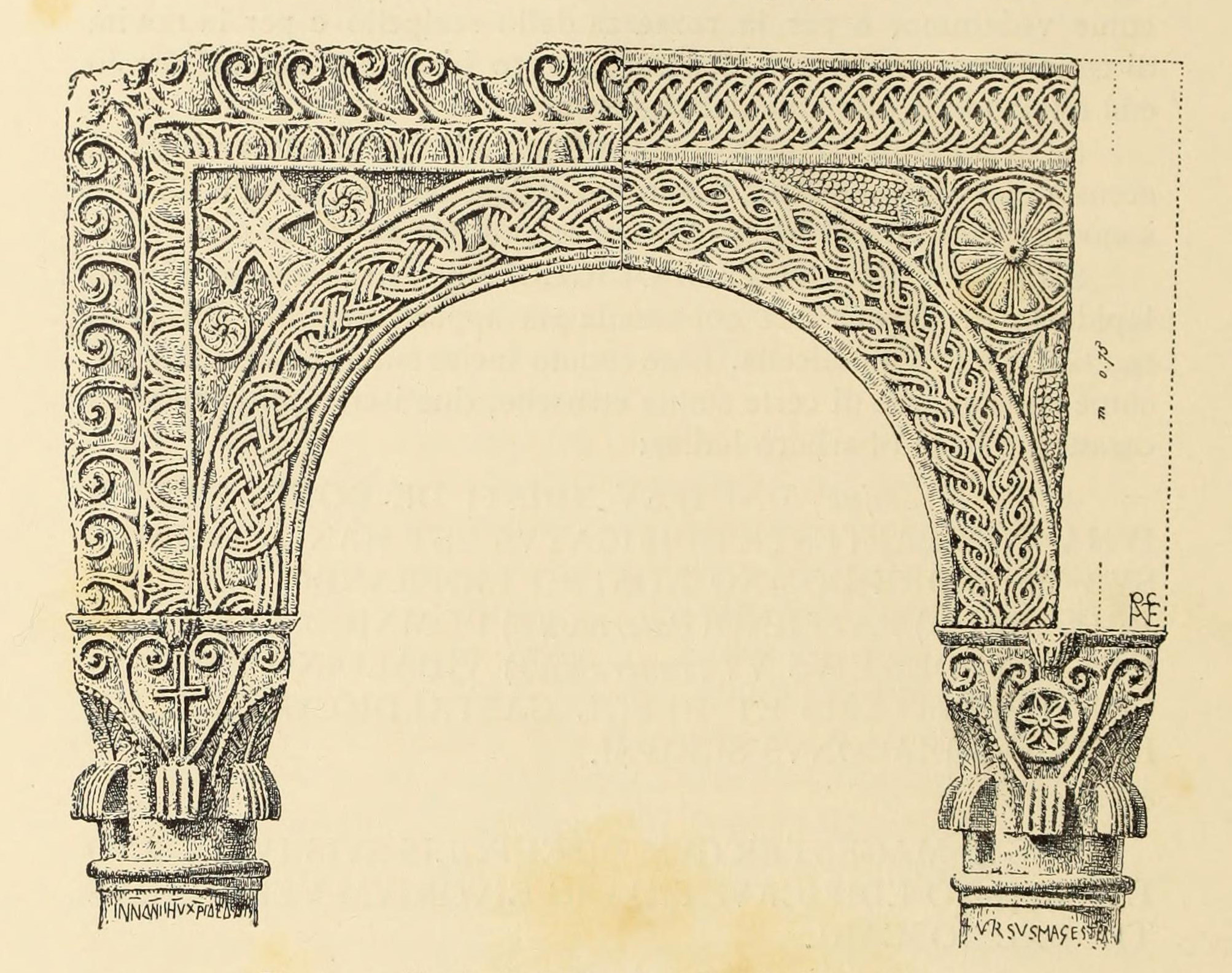 Raffaele Cattaneo, rilievo autografo del ciborio di San Giorgio in Valpolicella per il libro ‘’L'architettura in Italia dal secolo VI al mille circa’’